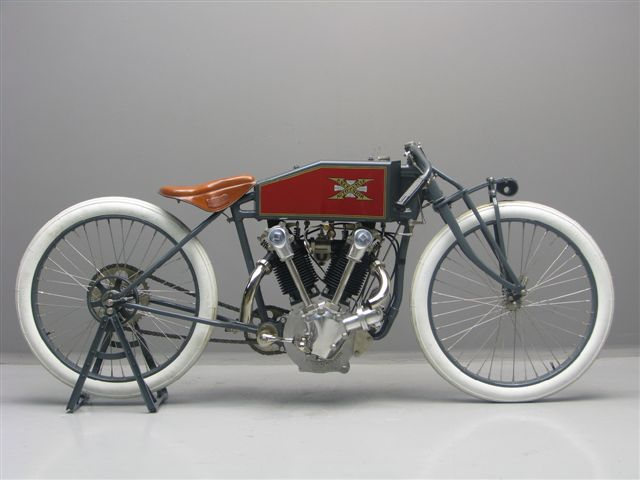 Excelsior OHC racing motorcycle from 1919